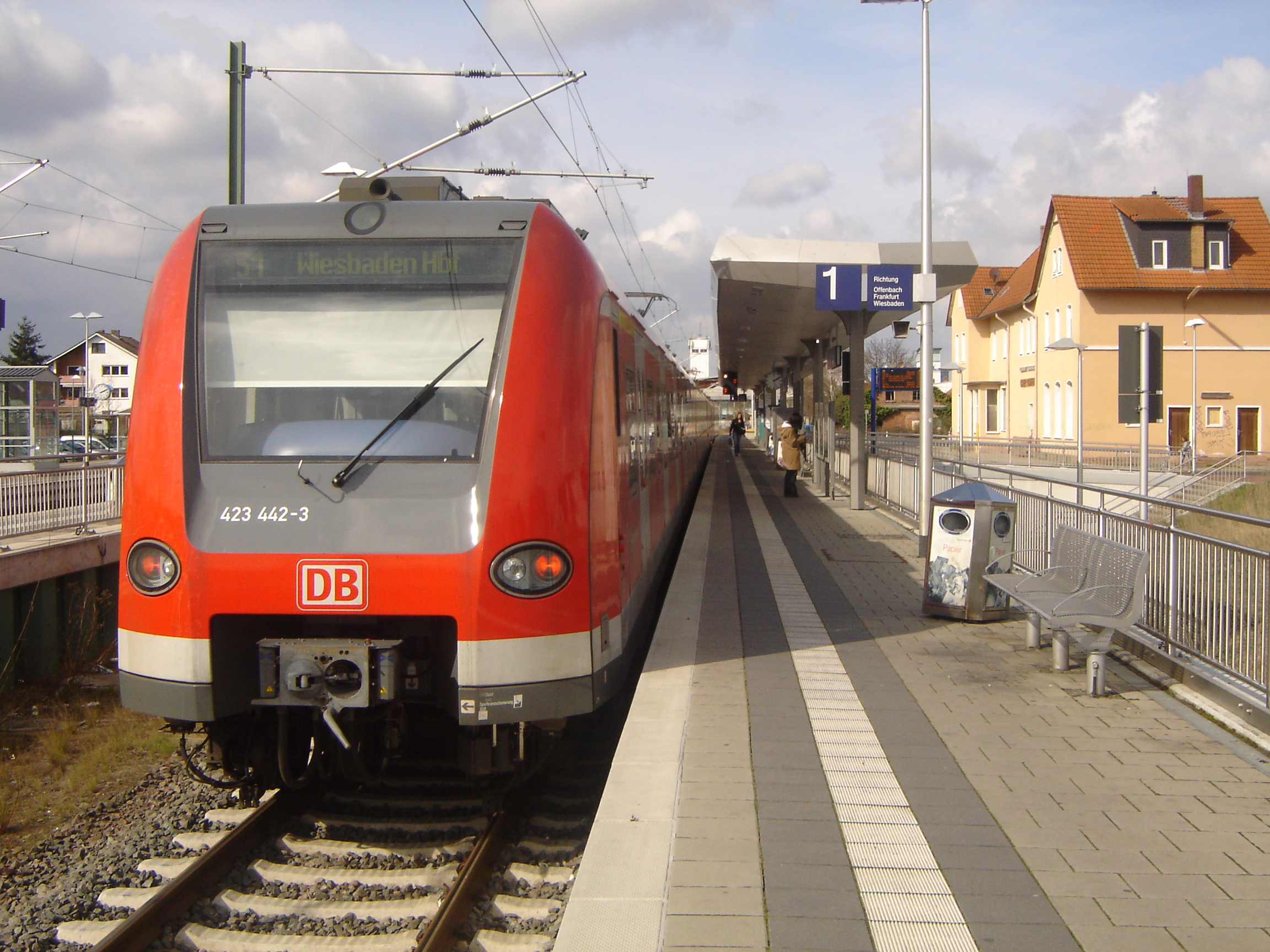 Ein ET423 der S-Bahn Rhein-Main auf der Linie S1 in Rödermark-Ober-Roden